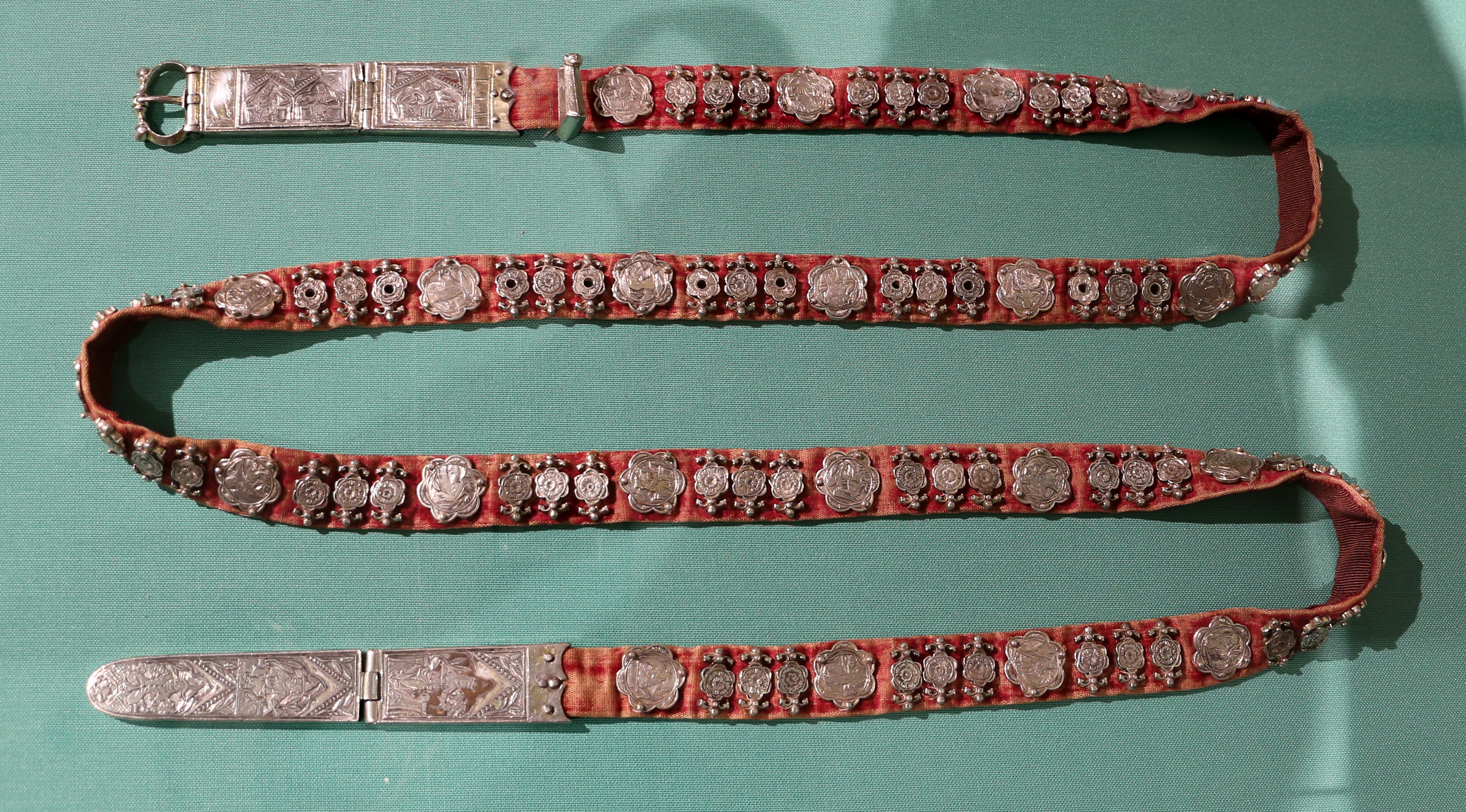 Museo civico (Prato) This is a photo of a monument which is part of cultural heritage of Italy.